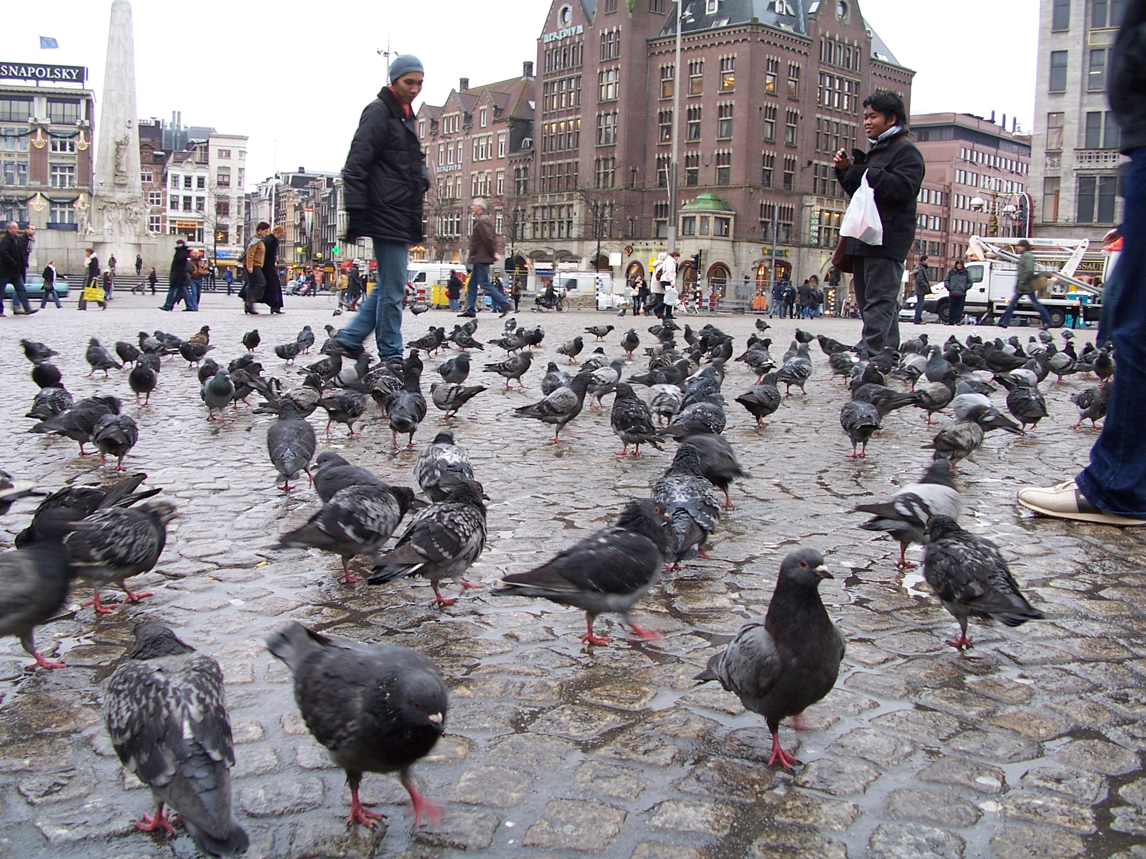 Duiven op de Amsterdamse Dam in 2007.